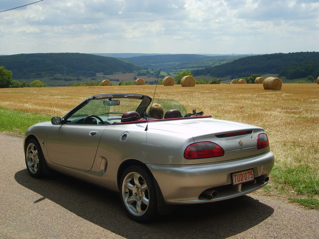 MGF